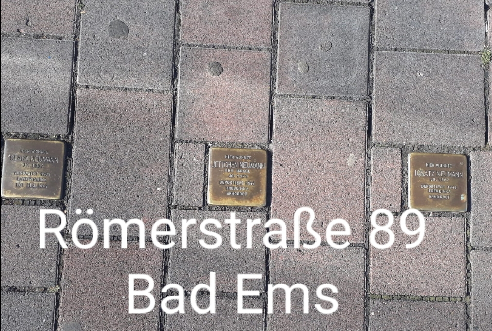 StolpersteinBadEms